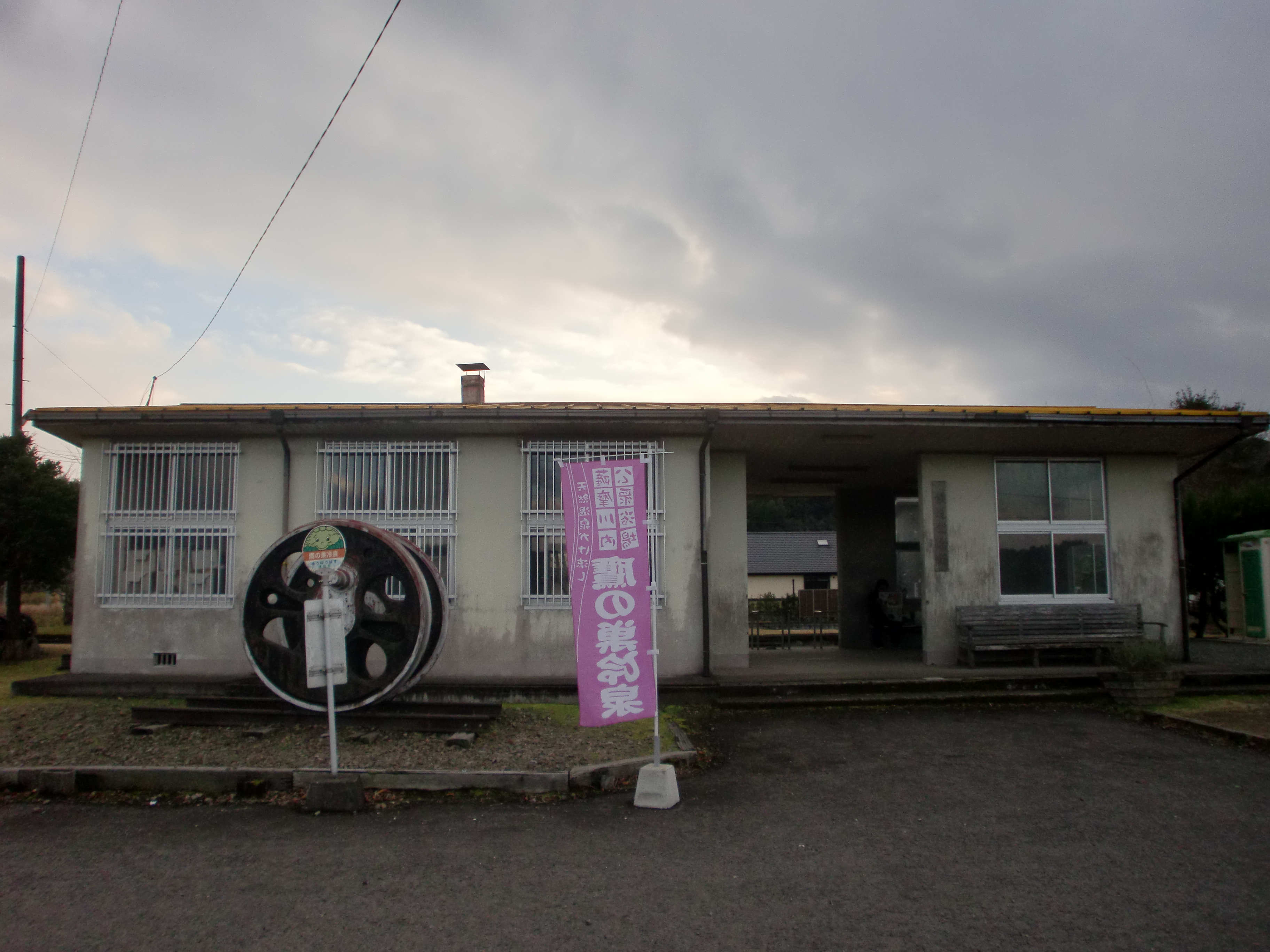 樋脇駅（宮之城線）の外観。（前回撮影の取り直し）